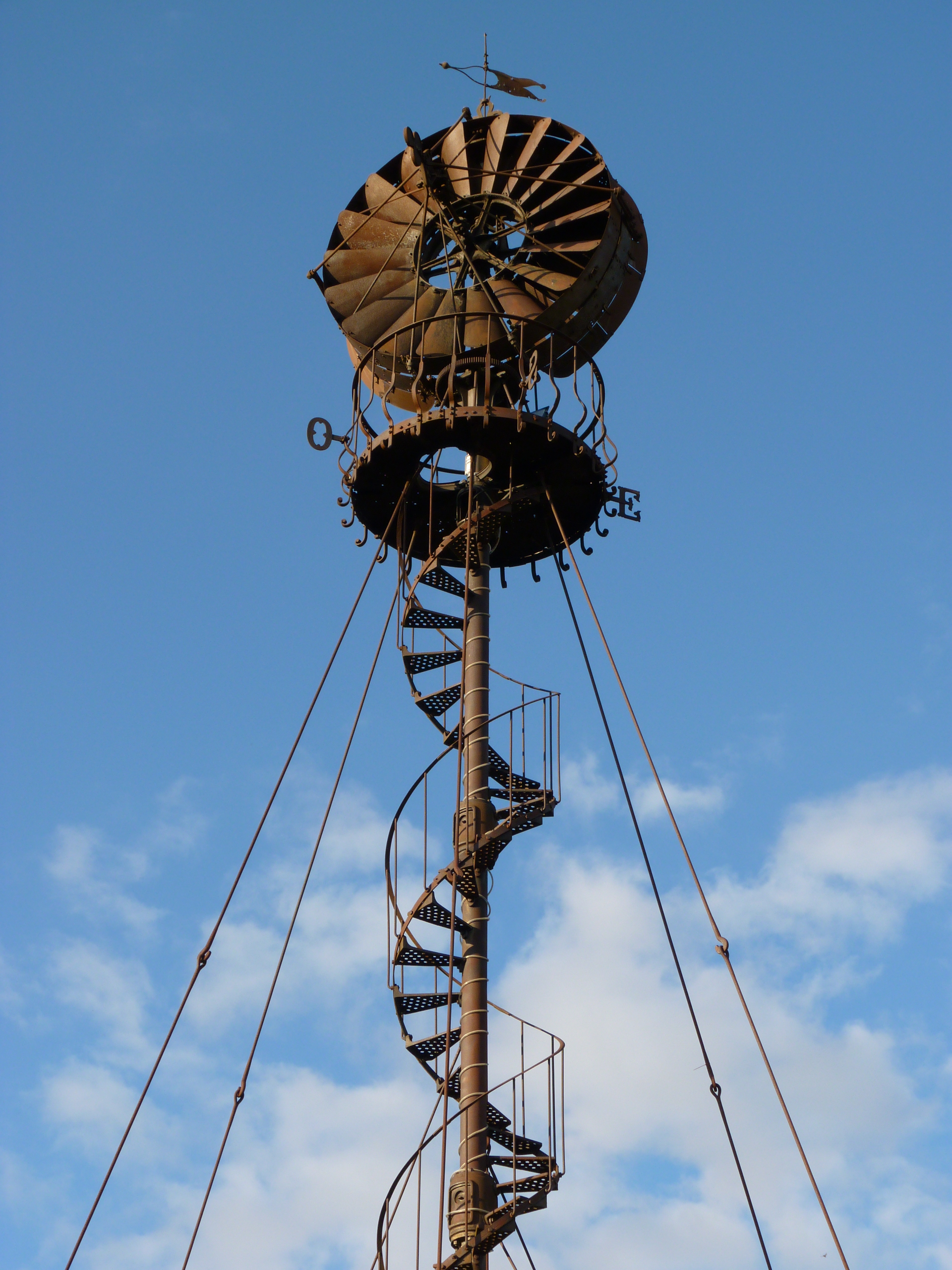 Eolienne colonne de Nogent-Le-Phaye (28)